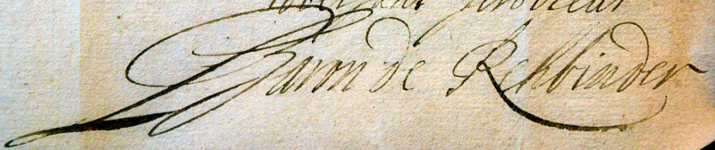 Firma autografa del maresciallo Bernhard Otto barone di Rehbinder.